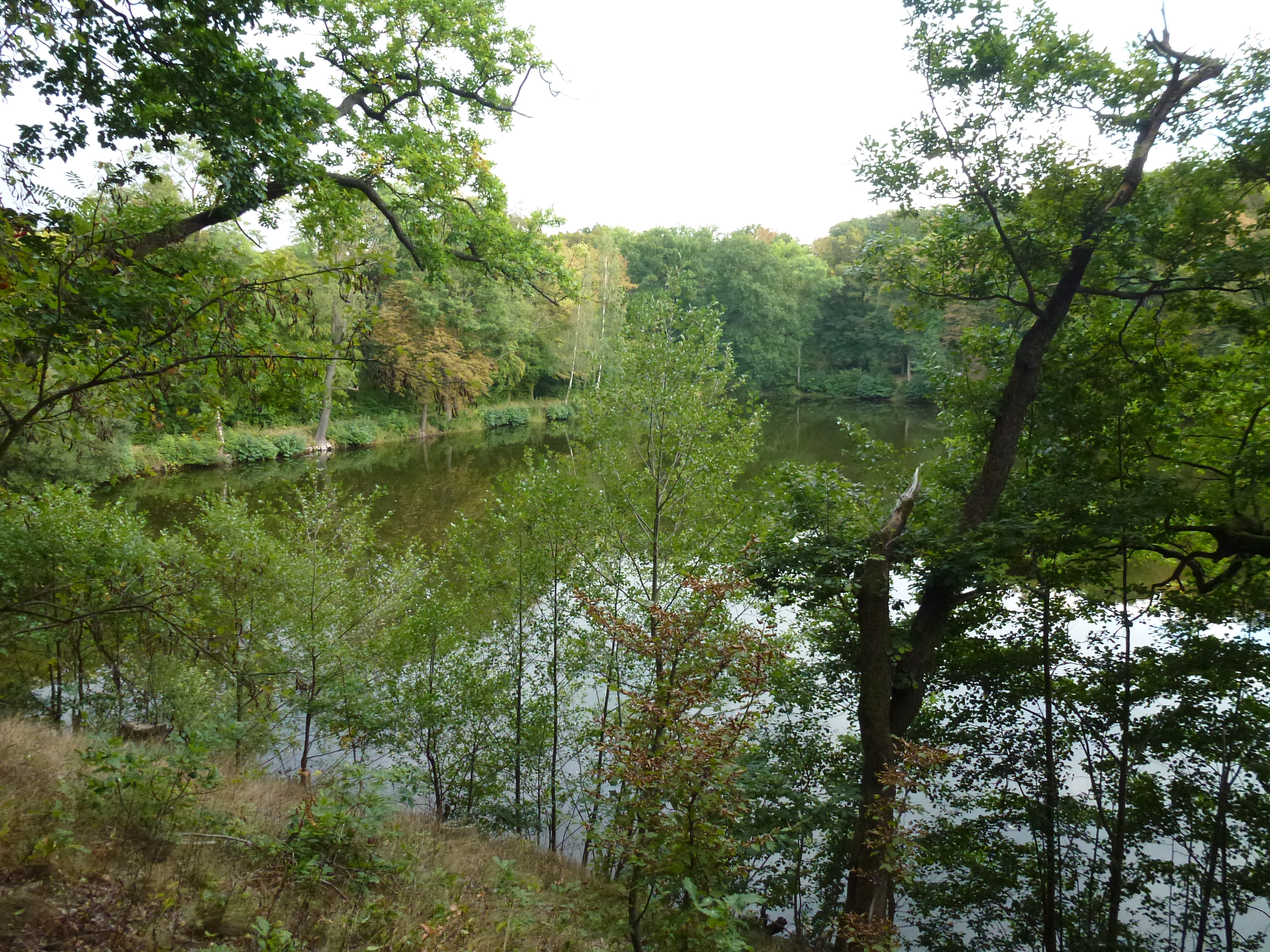 Glockenteich im Schlosspark Ballenstedt